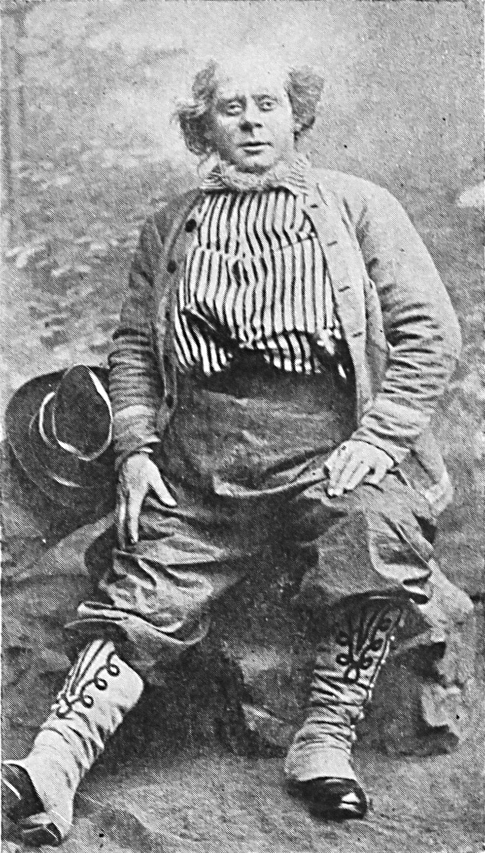 Den svenske skådespelaren Jean Sandberg som Pietro i Jacques Offenbachs Frihetsbröderna.